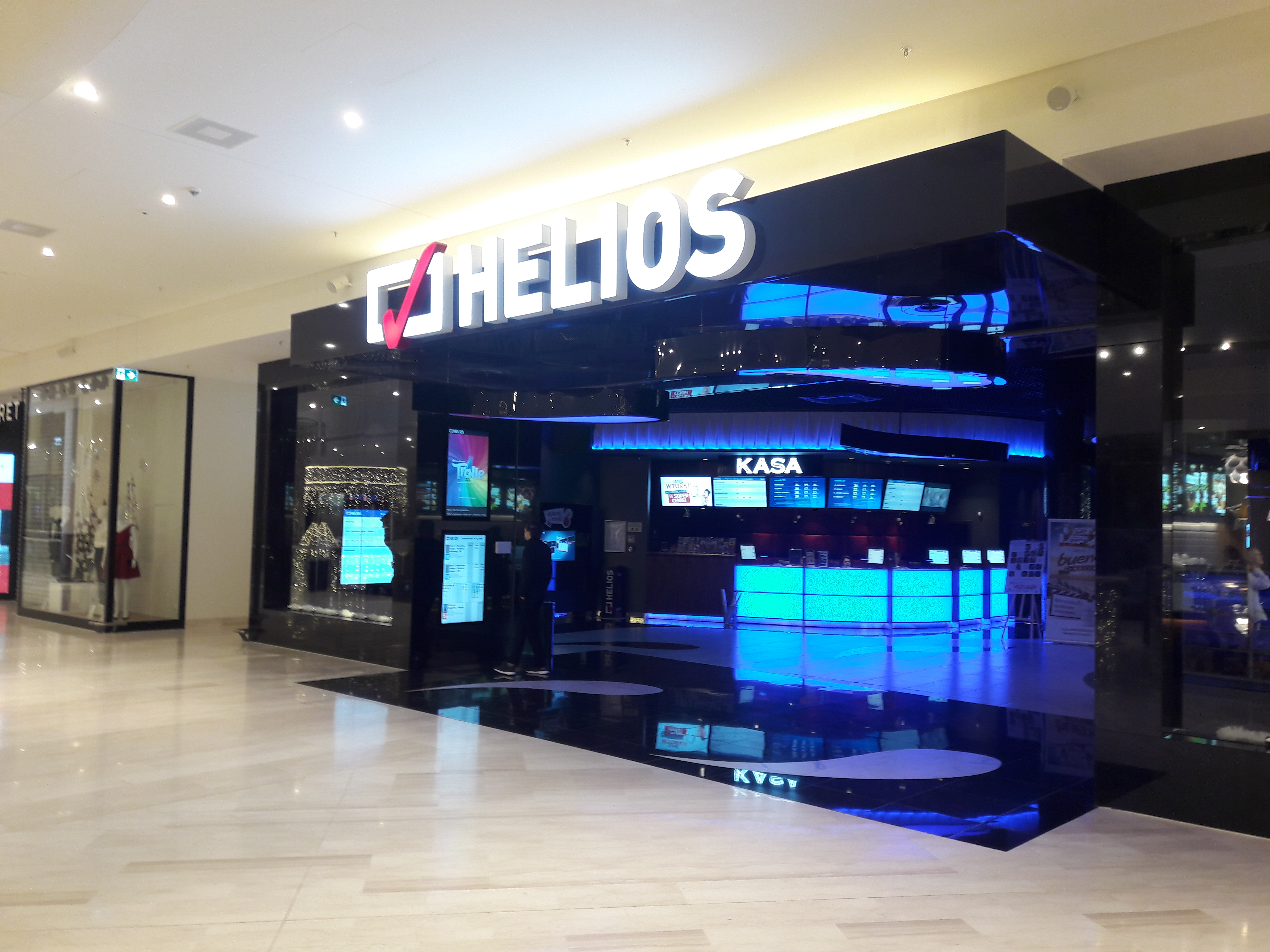 Galeria Posnania, Kino Helios